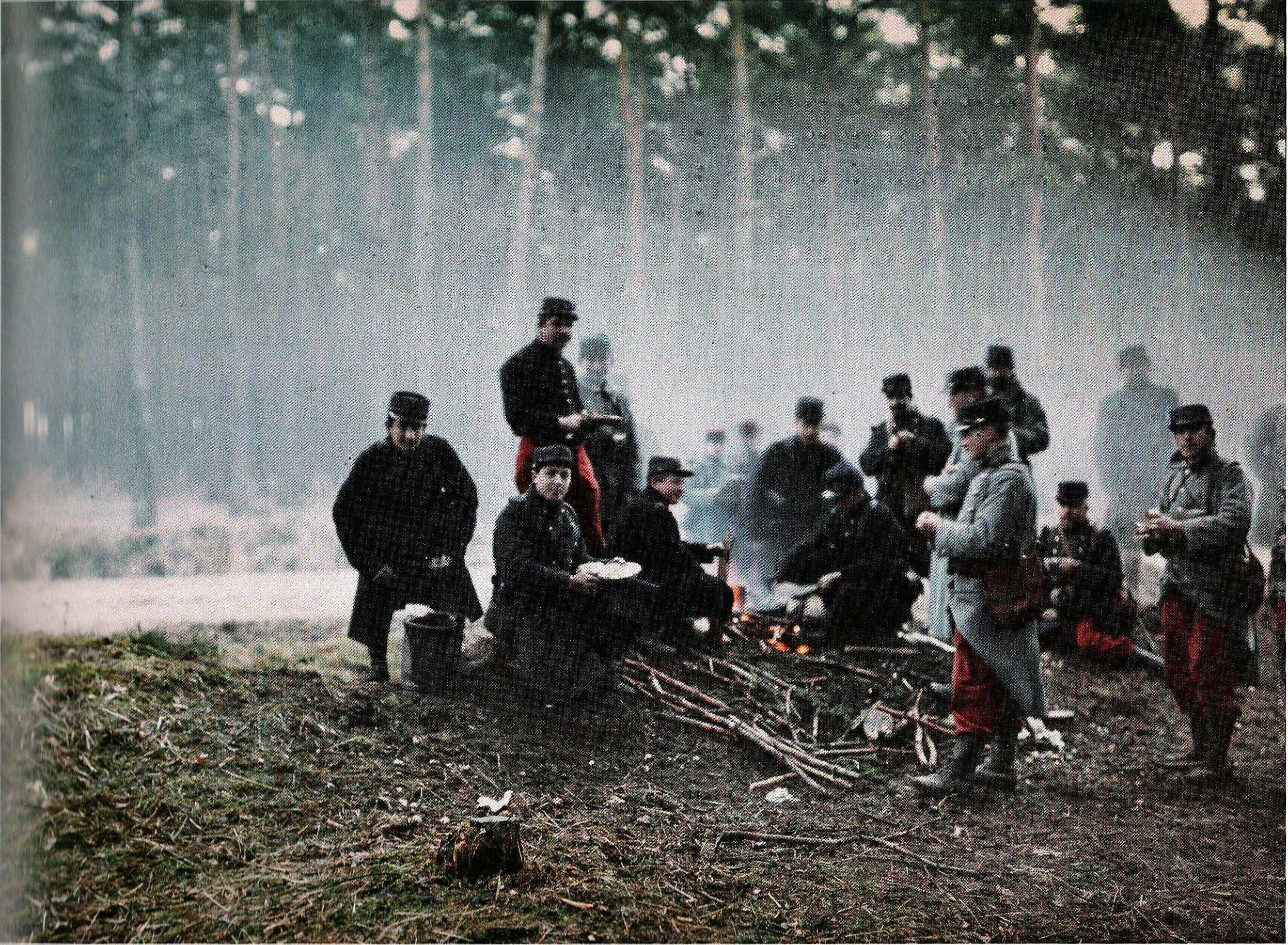 Au_bivouac,_1915_image N°7_p107 .